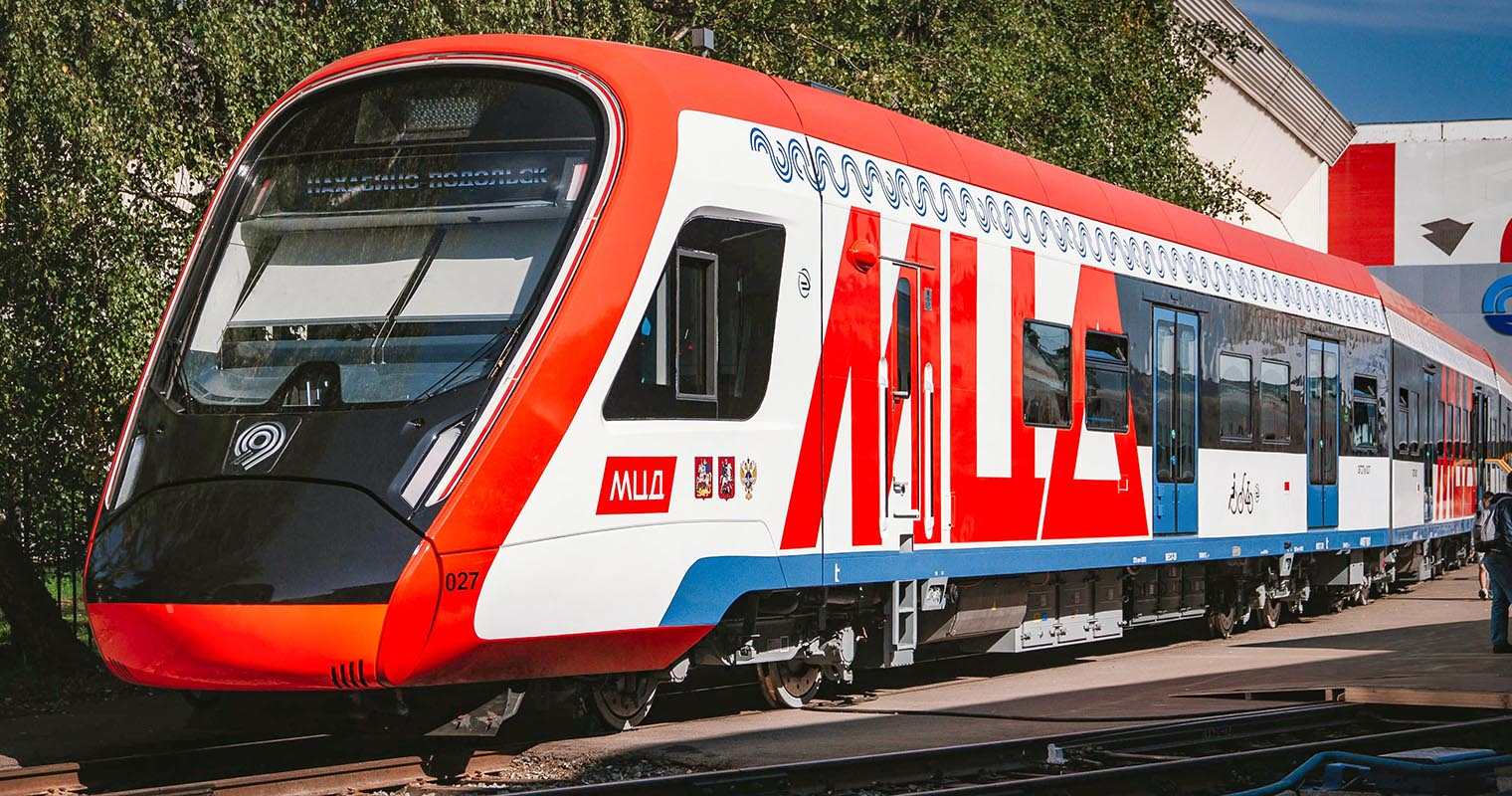 Головной и моторный вагоны электропоезда ЭГ2Тв-027 «Иволга» на территории депо кольца ВНИИЖТ в Щербинке на выставке Экспо-1520 2019 года